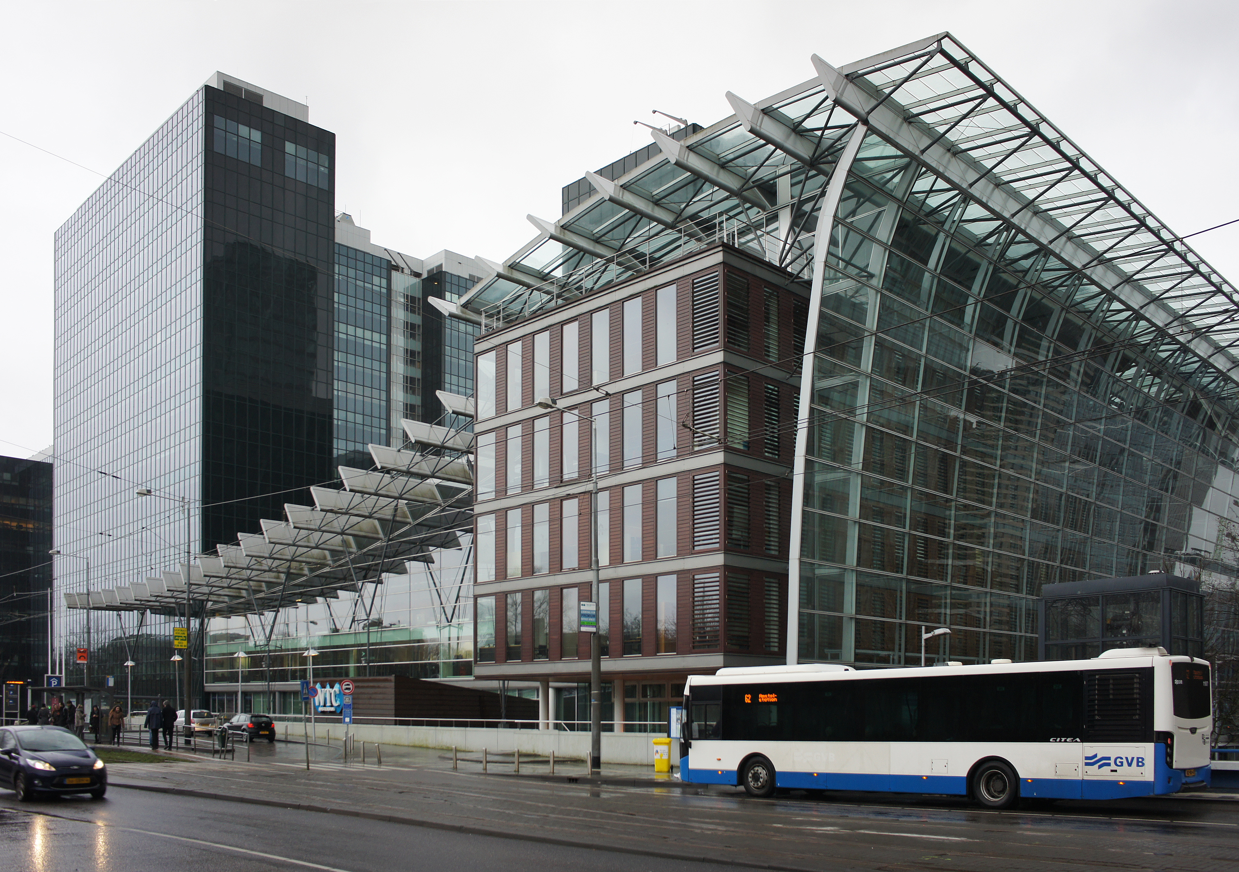 Amsterdam, near station Zuid